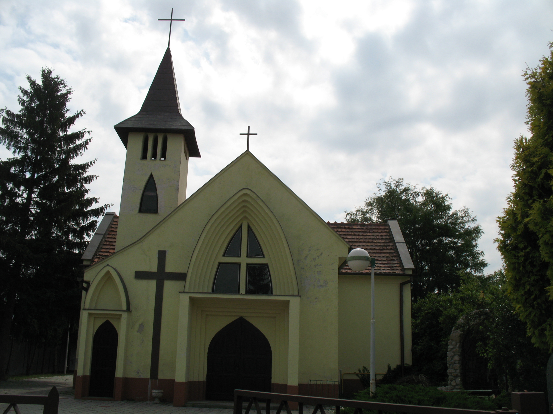 Nagyudvarnok